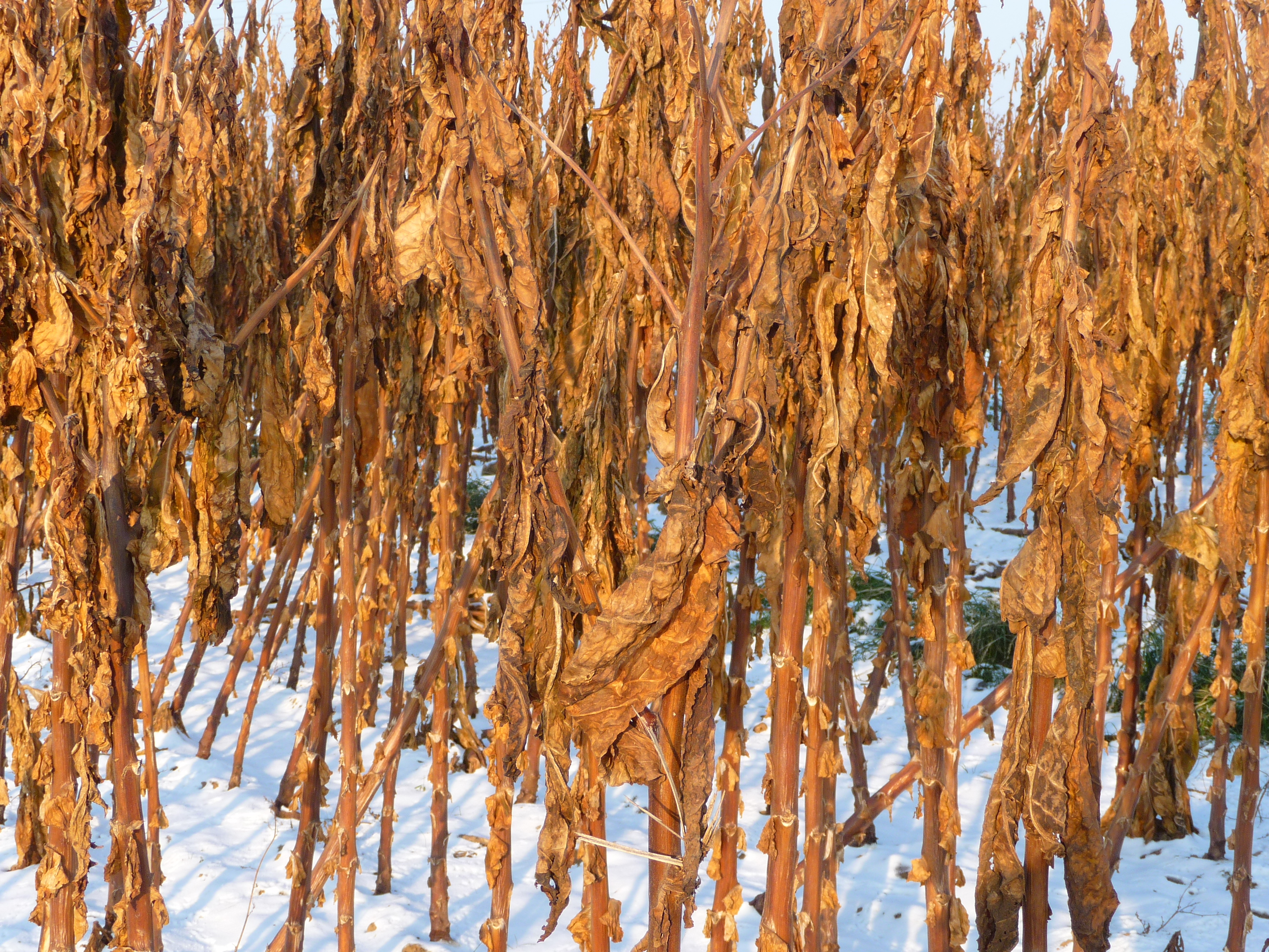 erfrorene Tabakpflanzen auf einem nicht abgeernteten Feld nach mehrwöchigem Frost von bis zu - 15 Grad Celsius